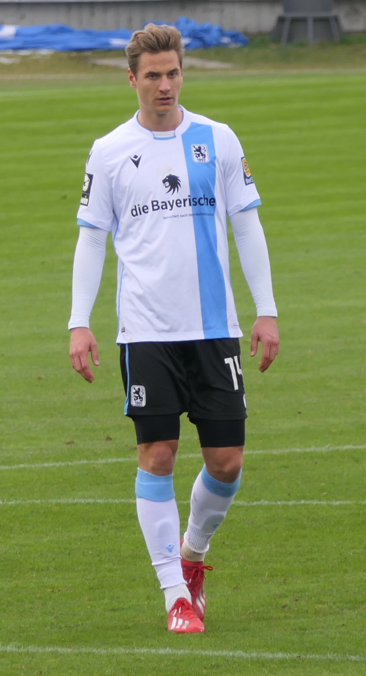 Der Fussballprofi Dennis Dressel im Trikot vom TSV 1860 München beim Heimspiel gegen Eintracht Braunschweig am 26.01.2020.